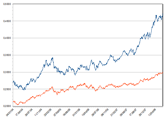 Cours du Zloty face à l'Euro (en rouge) et au Dollar (en bleu) entre le 1er janvier 2004 et le 30 juin 2008.